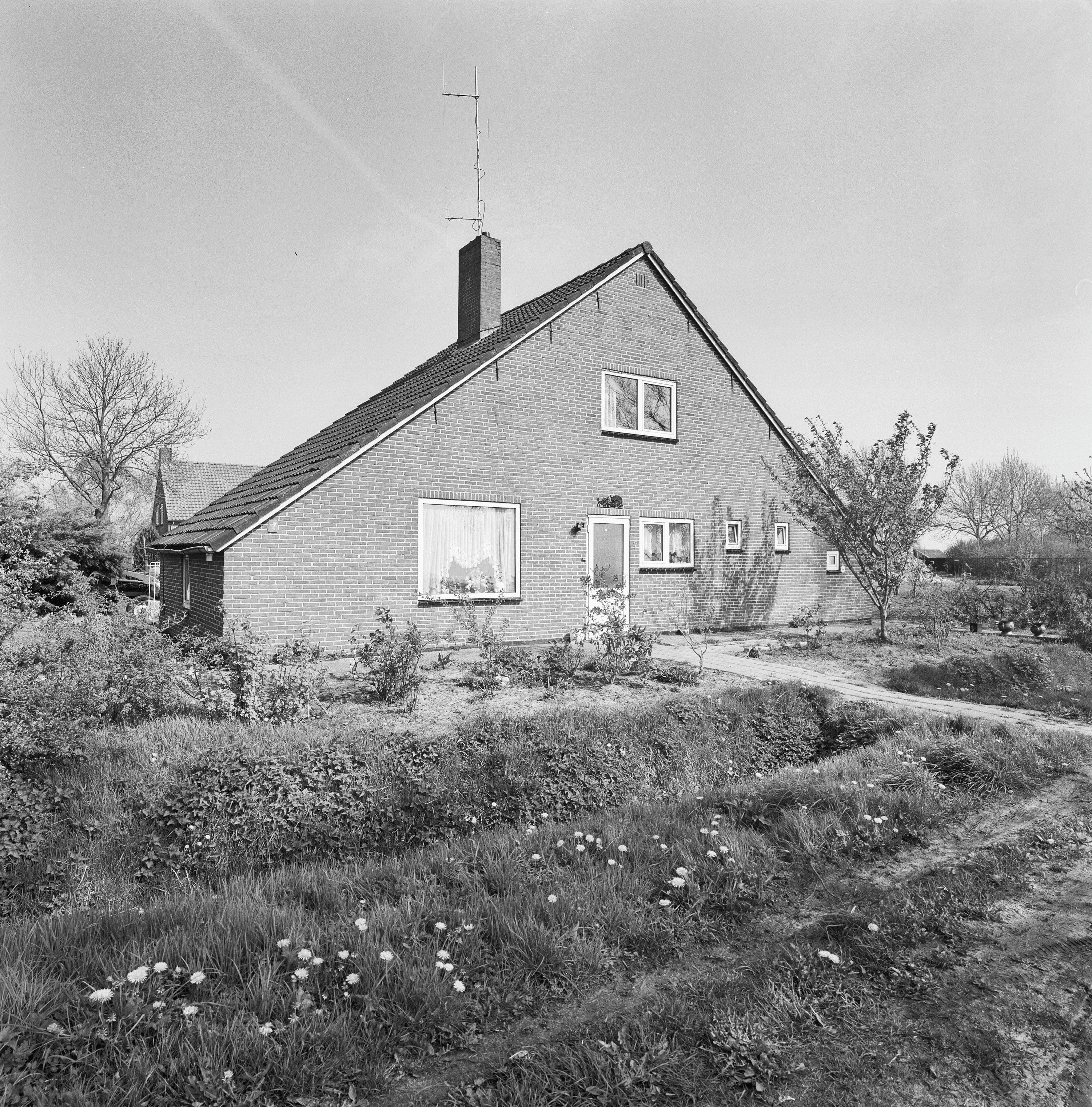 Arbeiderswoning: Overzicht voorgevel en linker zijgevel dubbele arbeiderswoning (opmerking: Gefotografeerd voor Monumenten In Nederland Groningen)